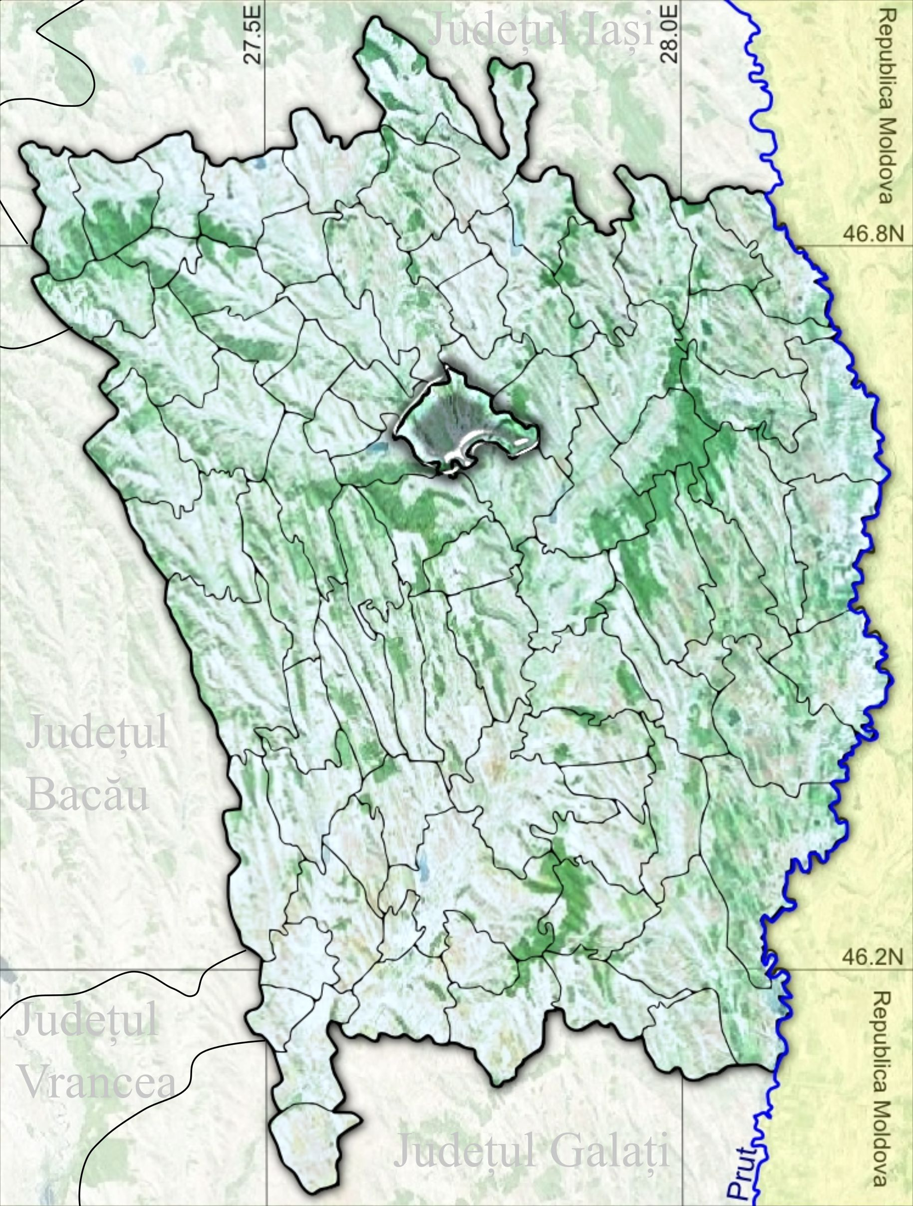 Vaslui jud Vaslui.